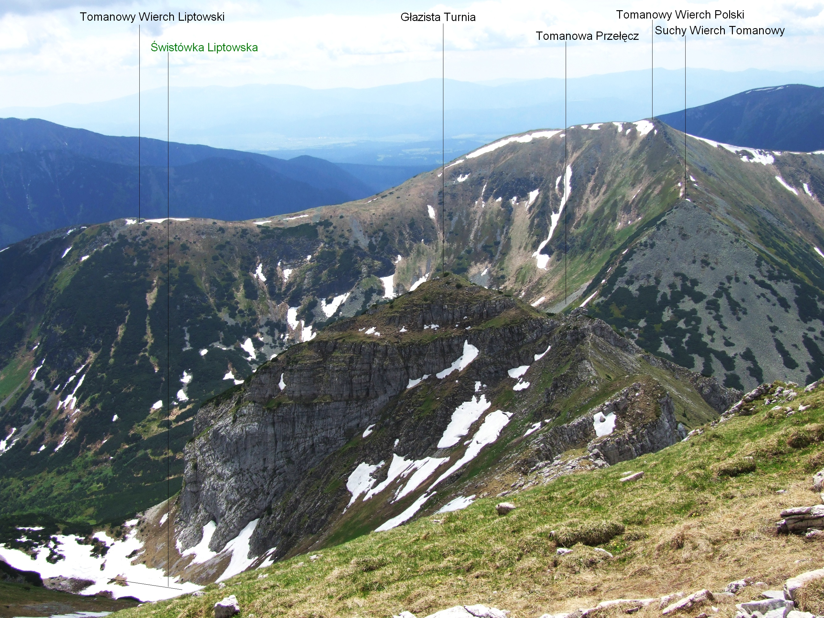 Widok z Ciemniaka na południe